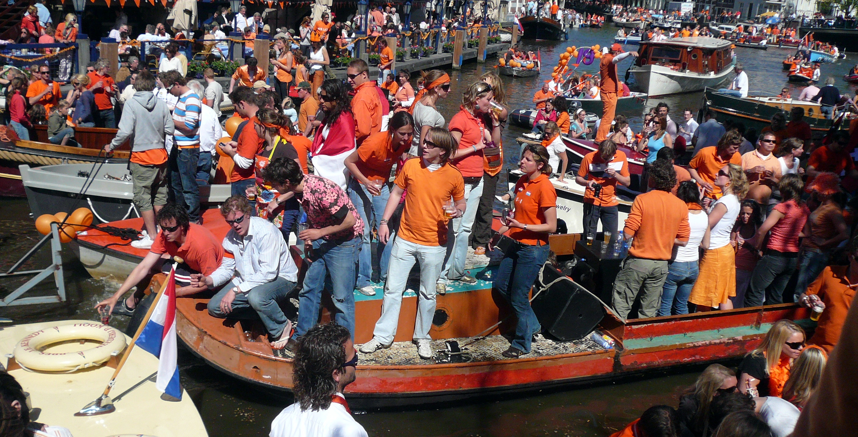 Koniginnedag 2007 Amsterdam